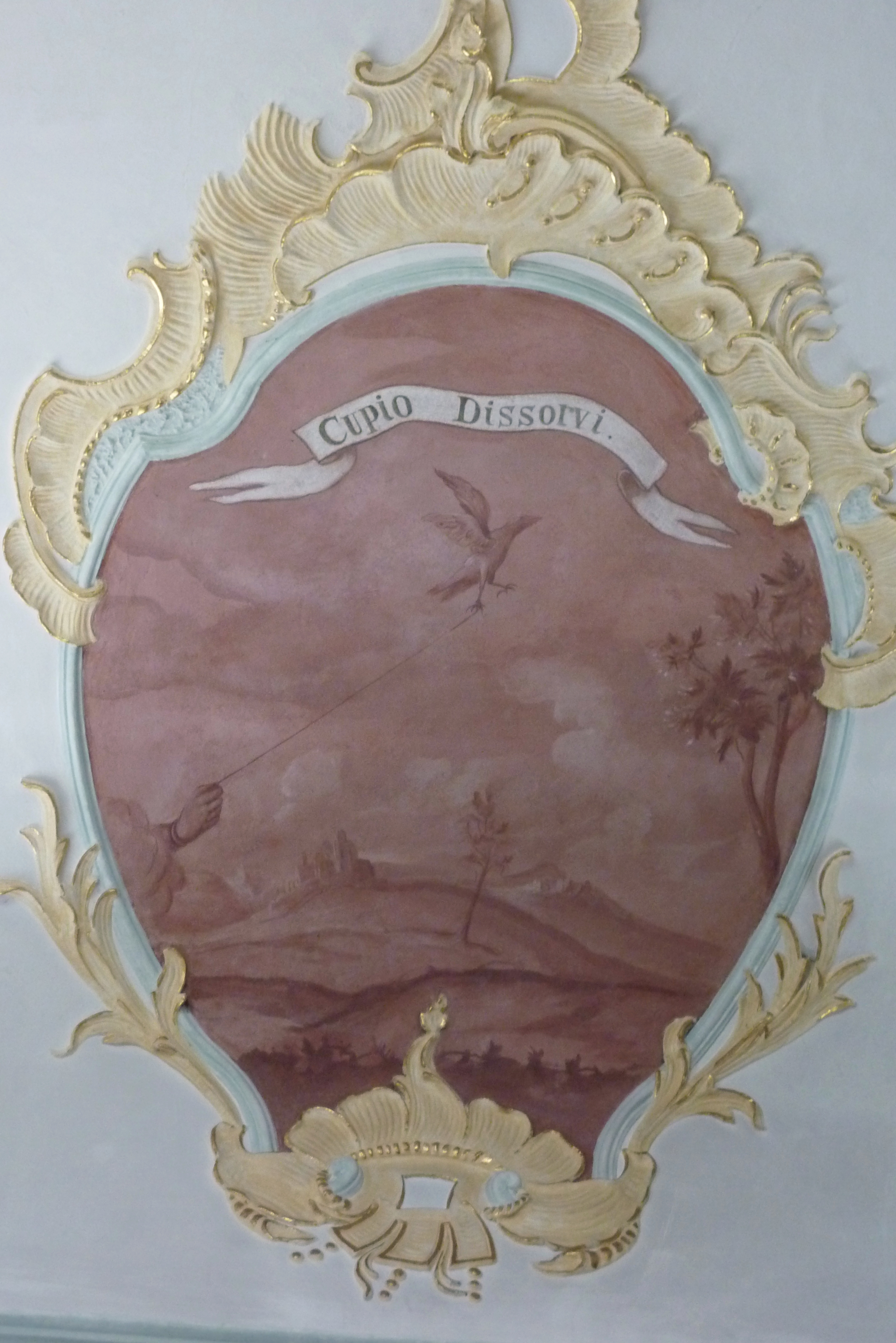 Katholische Pfarrkirche St. Peter und Paul in Sonderheim (Höchstädt an der Donau), Deckenmalerei und Stuck aus der Zeit um 1756, Kartusche mit Emblemen, Darstellung: auffliegender Vogel, den eine Hand an einer Schnur hält; Inschrift: „Cupio Dissolvi“ (Ich habe Lust, aus der Welt zu scheiden, nach dem Paulusbrief an die Philipper 1,23)